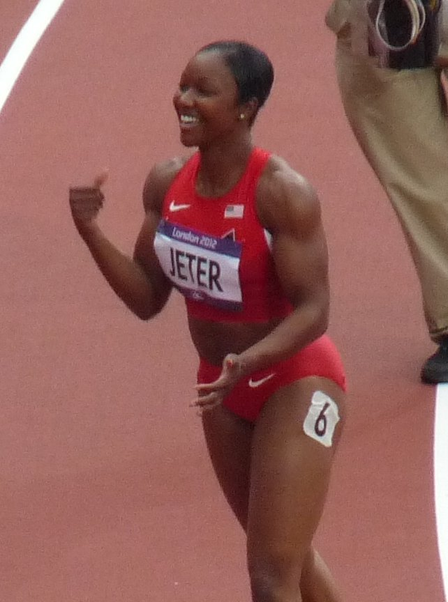 Jeter after 100m Heat - London 2012